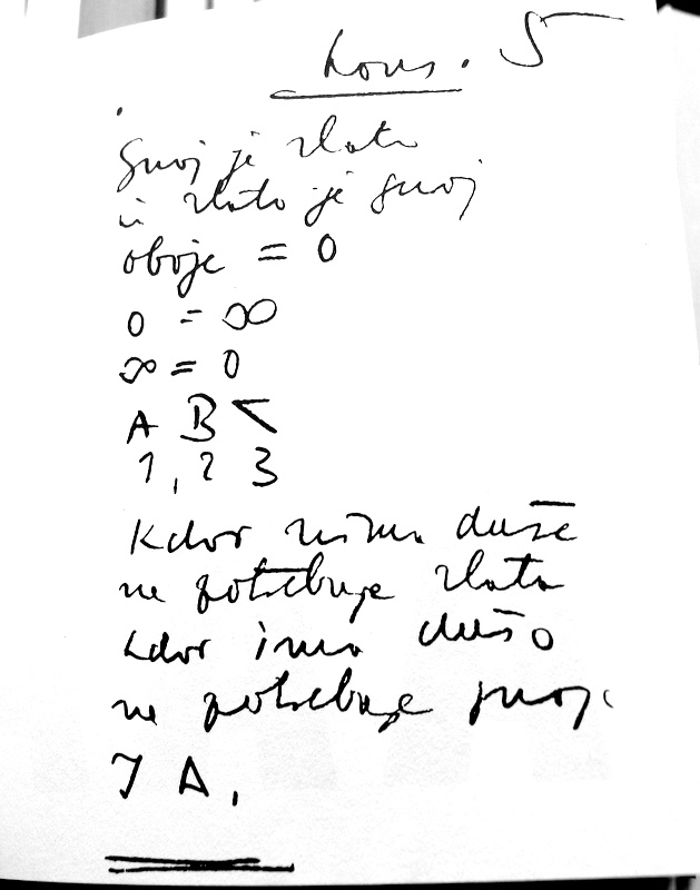 Manuscript of Srečko Kosovel's Kons. 5.